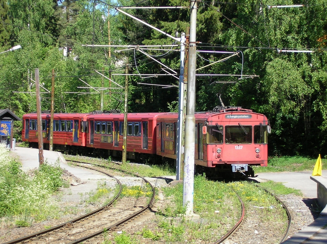 Et 1300-tog kjører ut fra Tjernsrud stasjon på Kolsåsbanen